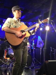 瀧澤克成さん